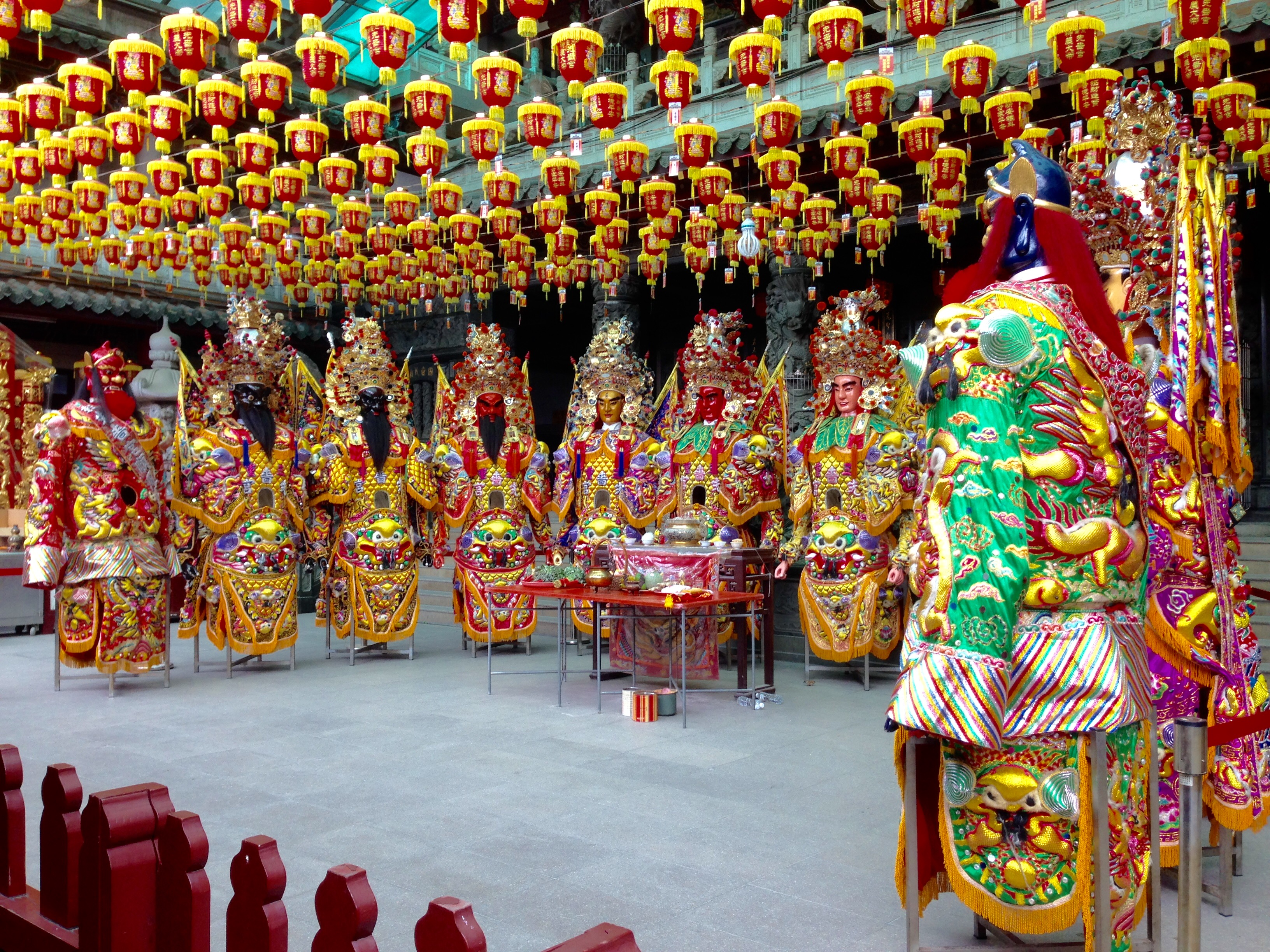 先嗇宮神將